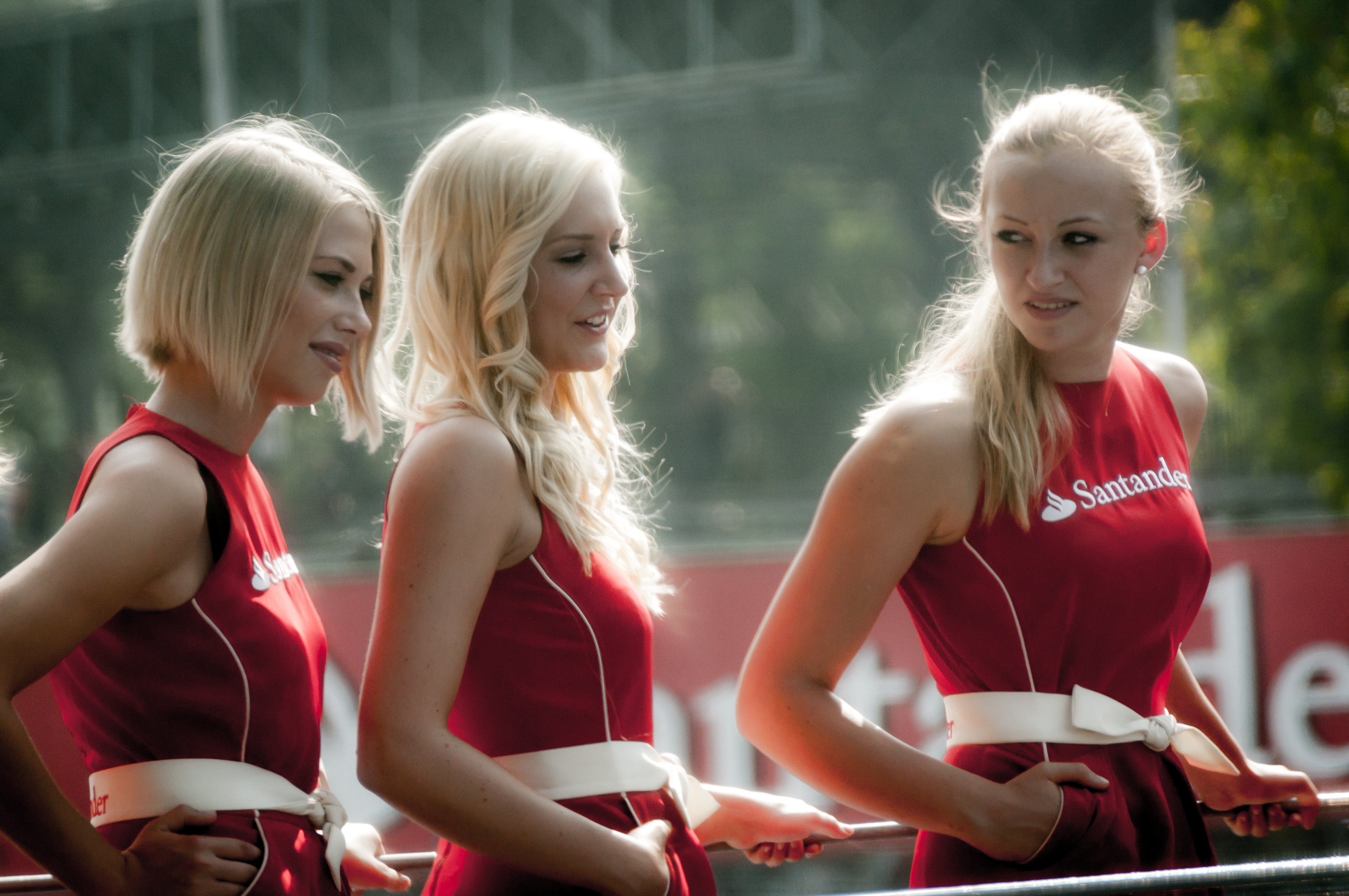 Formula One girls